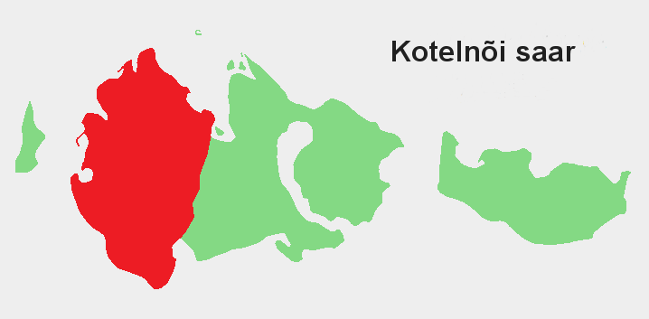 Kotelnõi saare asendikaart